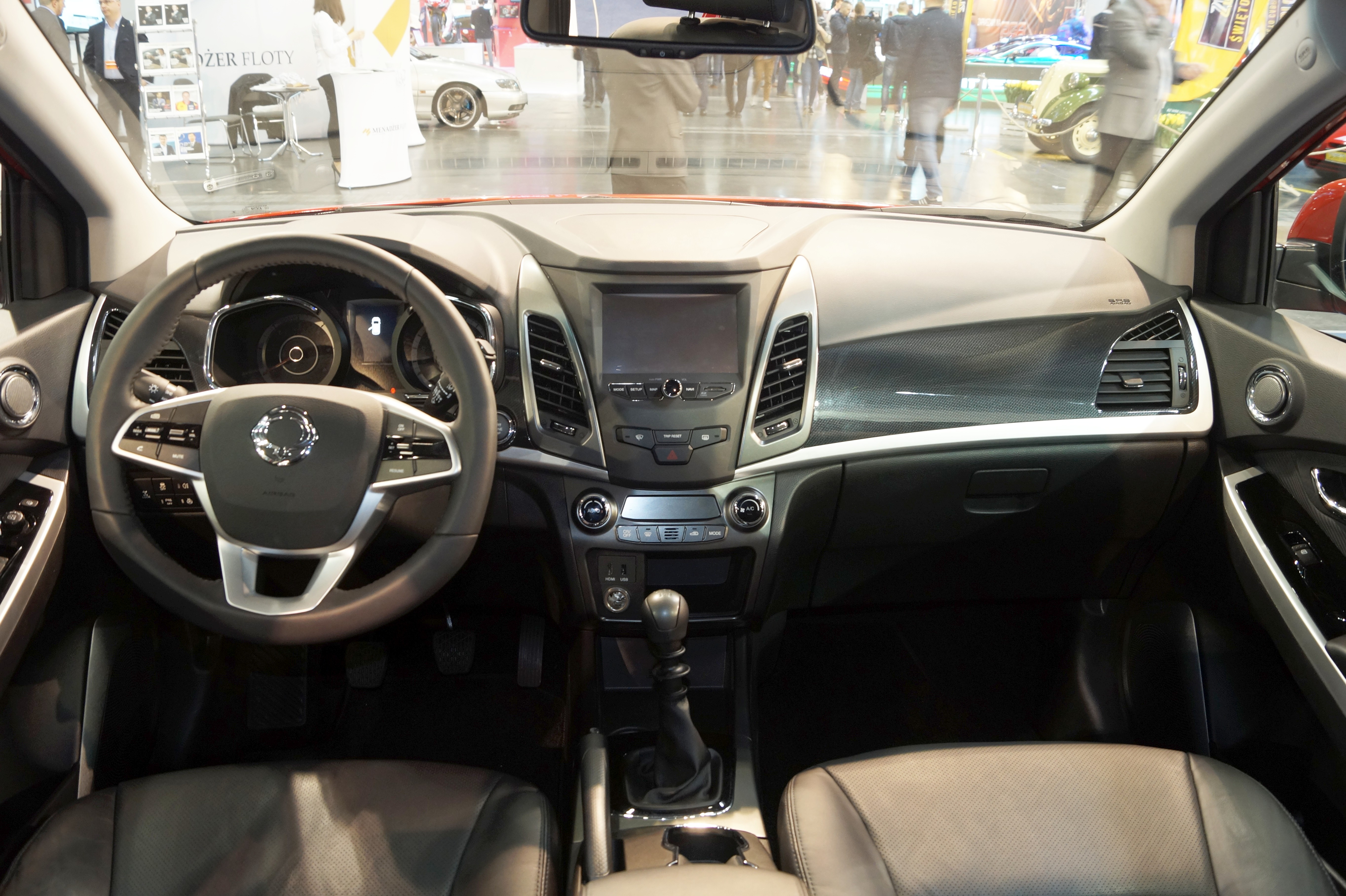 Wnętrze SsangYonga Korando na Motor Show Poznań 2017.